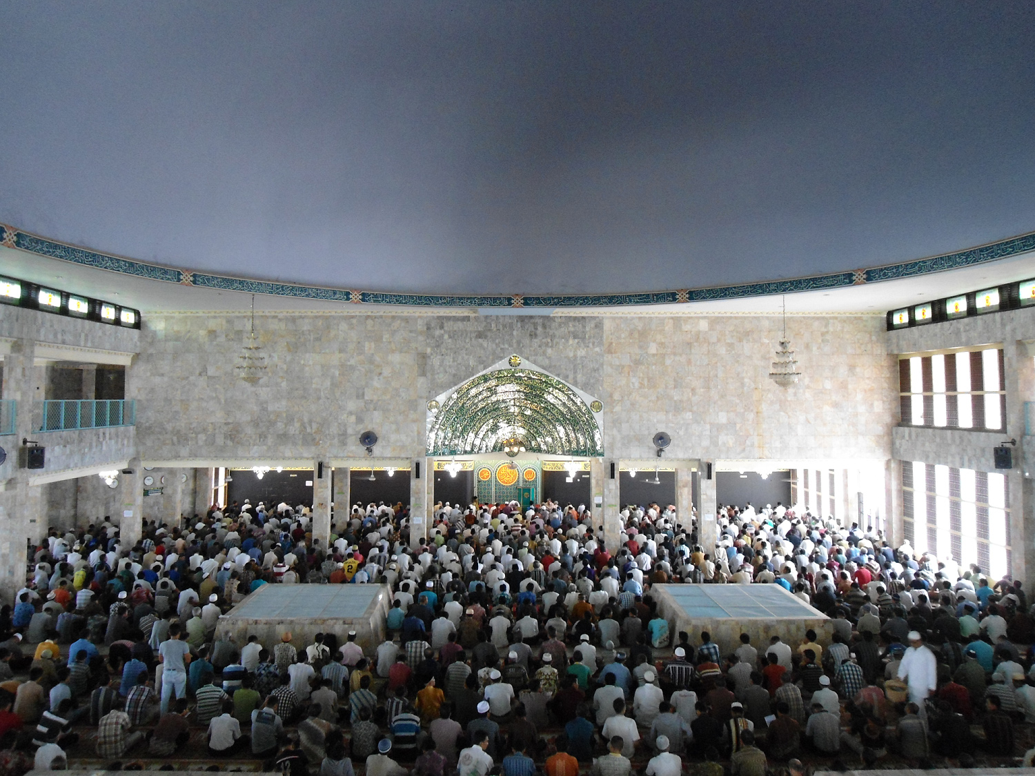 Masjid Muhammadiyah Padang